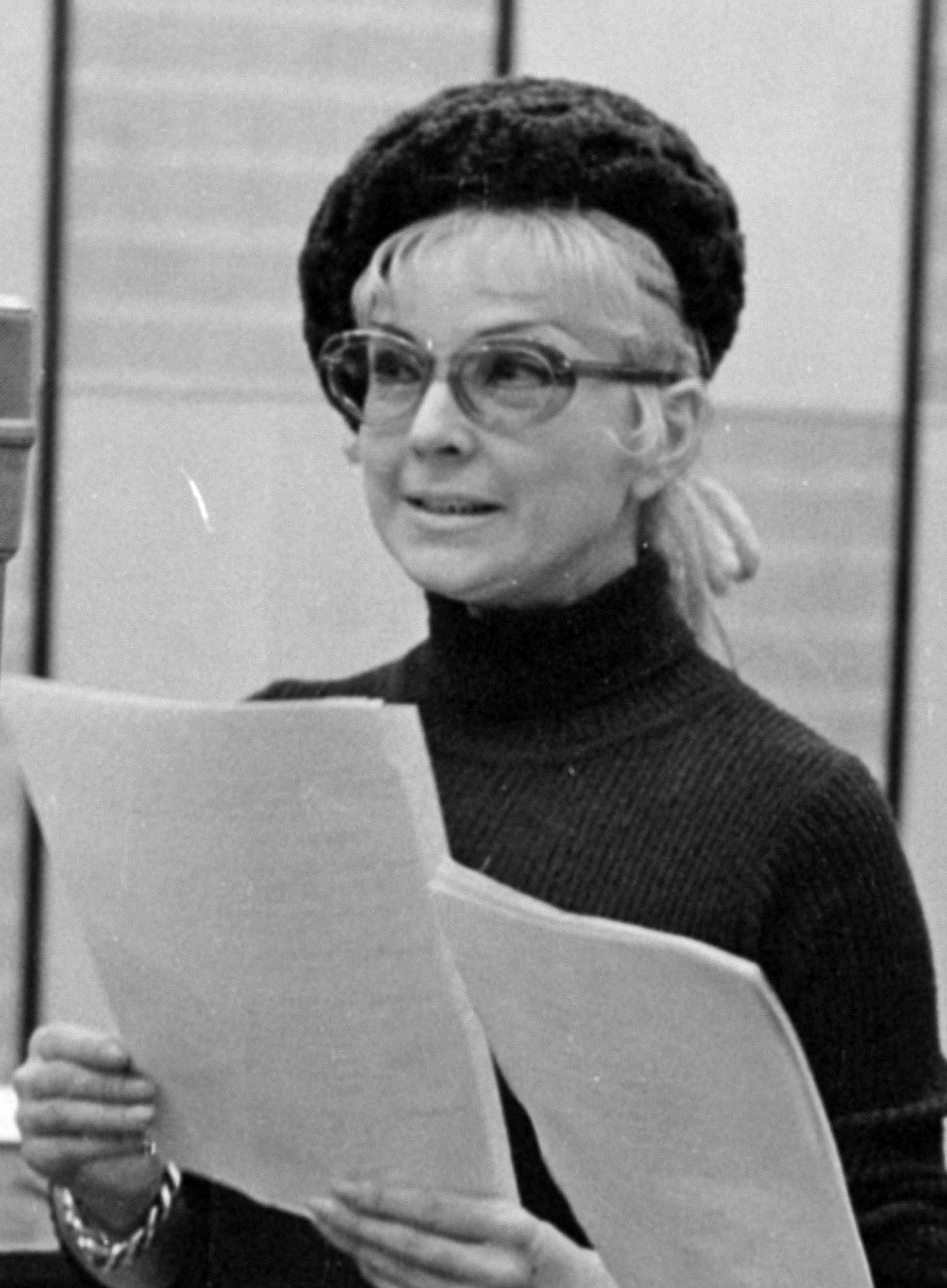 Házy Erzsébet magyar operaénekesnő (szoprán), színésznő